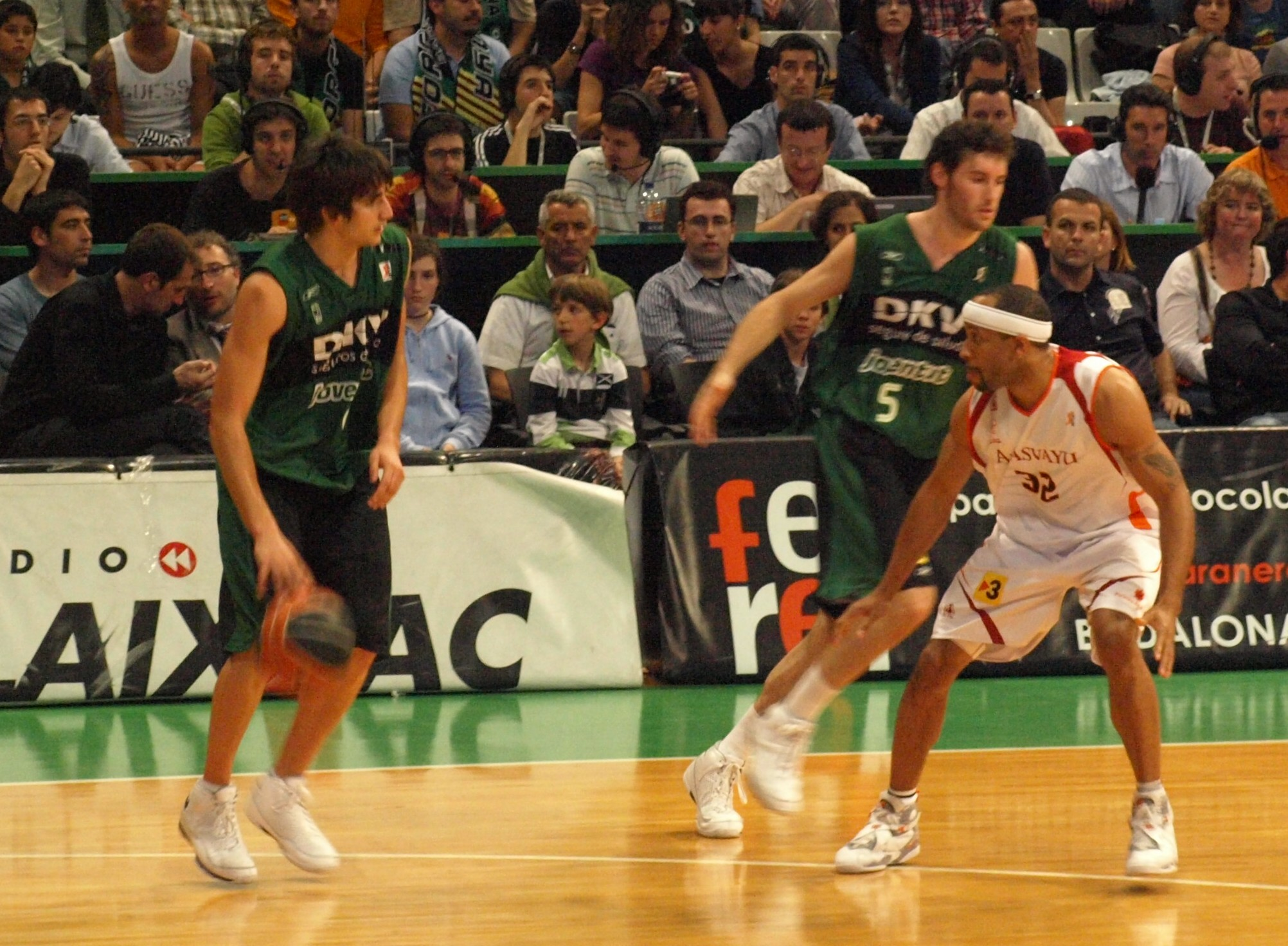 Ricky Rubio defendido por Maurice Whitefield del Akasvayu Girona en el 3er partido de los cuartos de final del play-off por el título de la liga ACB en el Pabellón Olímpico de Badalona